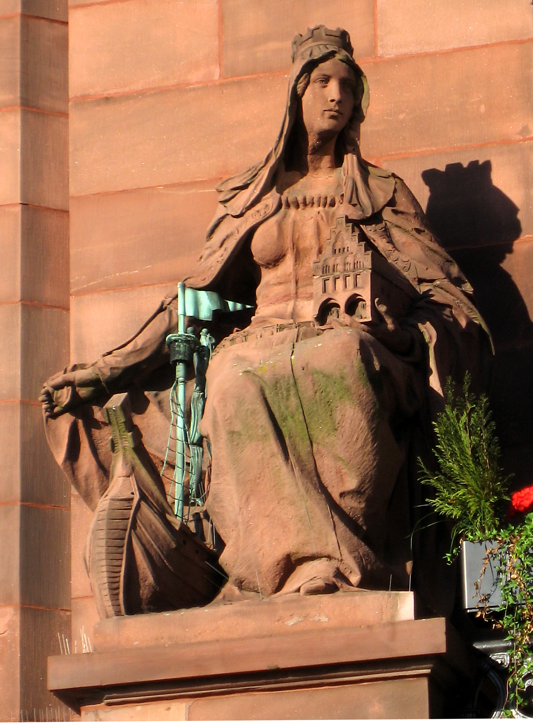 Altes Stadthaus (Dortmund, Friedensplatz), Figur über dem Portal mit Hansekogge und Altem Rathaus